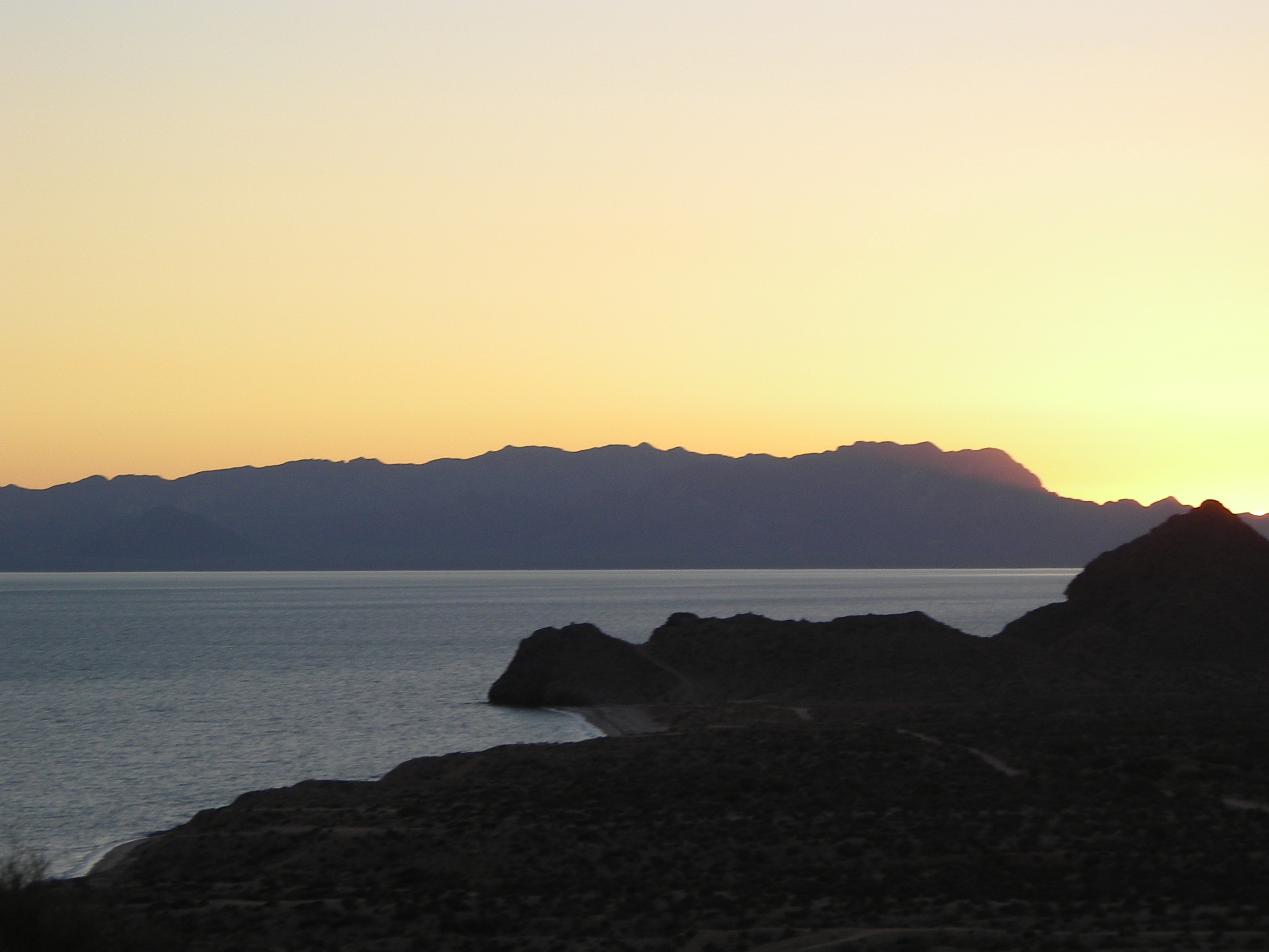 vista de la isla Tiburón desde un cerrito al norte de Bahía de Kino